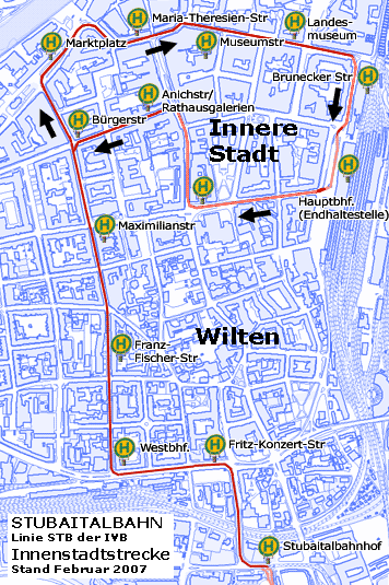 Stb-innenstadt